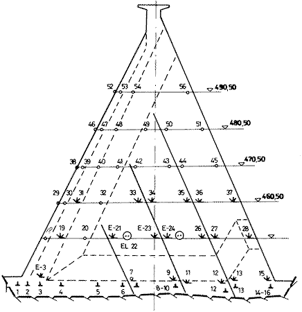 Secţiunea barajului + cote